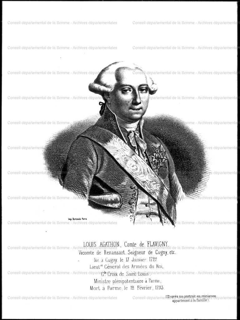 Portrait est celui de Louis-Agathon de Flavigny, gentilhomme picard, né à Cugny (département actuel de l'Aisne) et décédé à Parme (Italie) en 1793, qui a servi le roi pendant 38 ans dans l'armée avant d'entamer une carrière diplomatique. D'après un portrait en miniature appartenant à la famille.